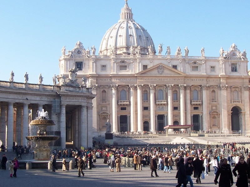 Città del Vaticano - Piazza S. Pietro